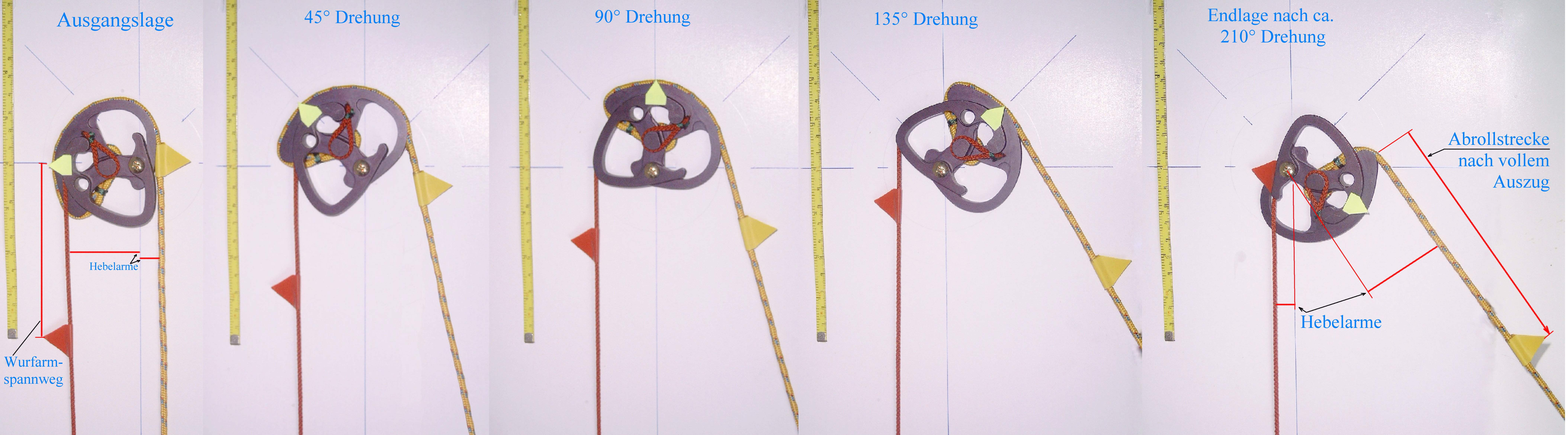 Darstellung eines Camwheels von einem Compoundbogen bei der Arbeit